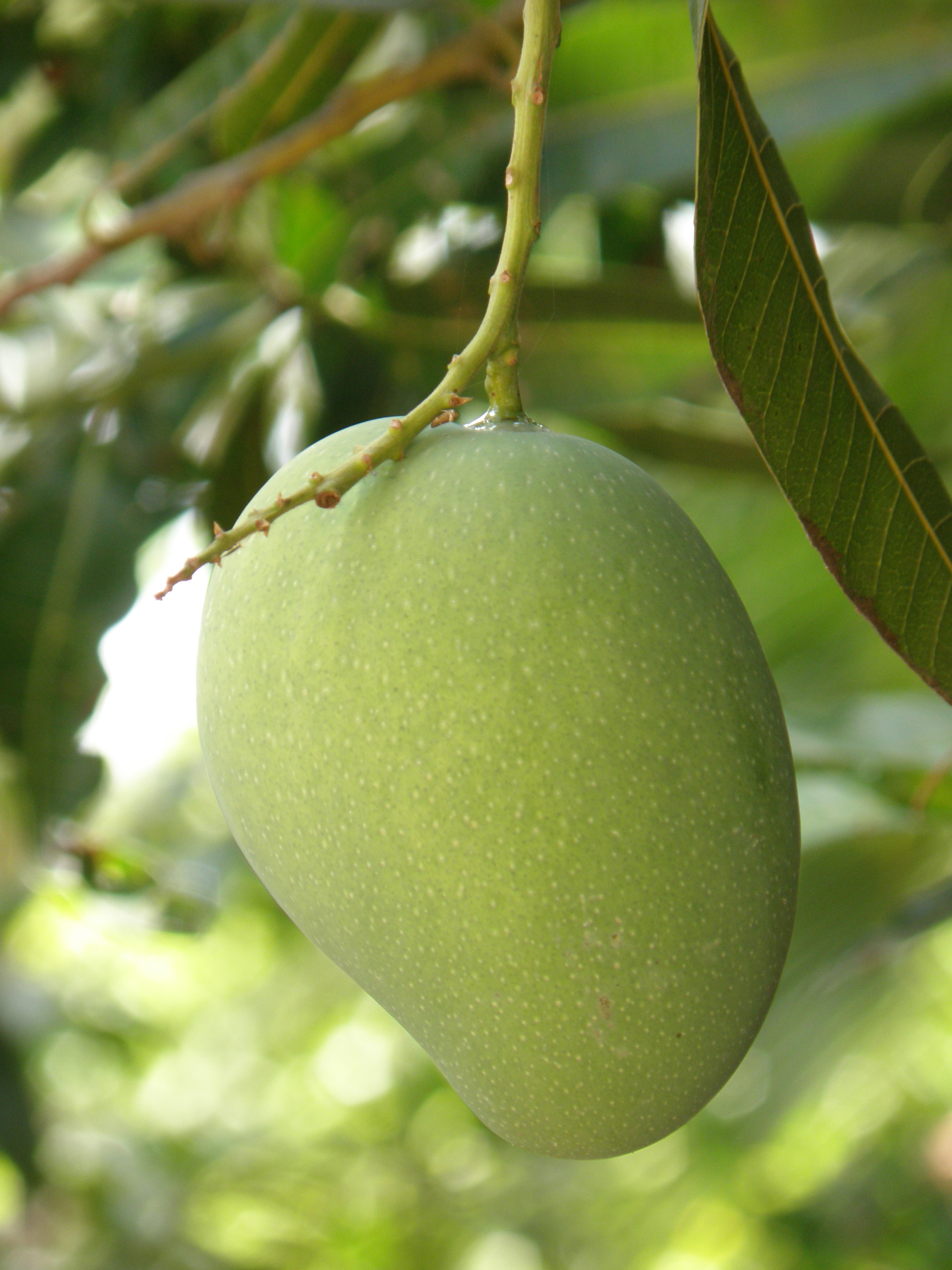 மாங்காய்